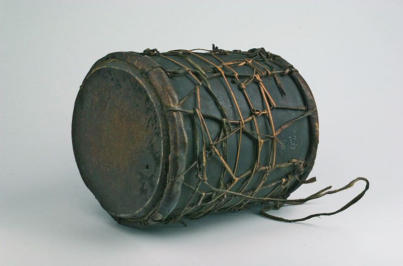 Slaginstrument. Dubbelvellige cilindrische trom Unknown language: Geundrang